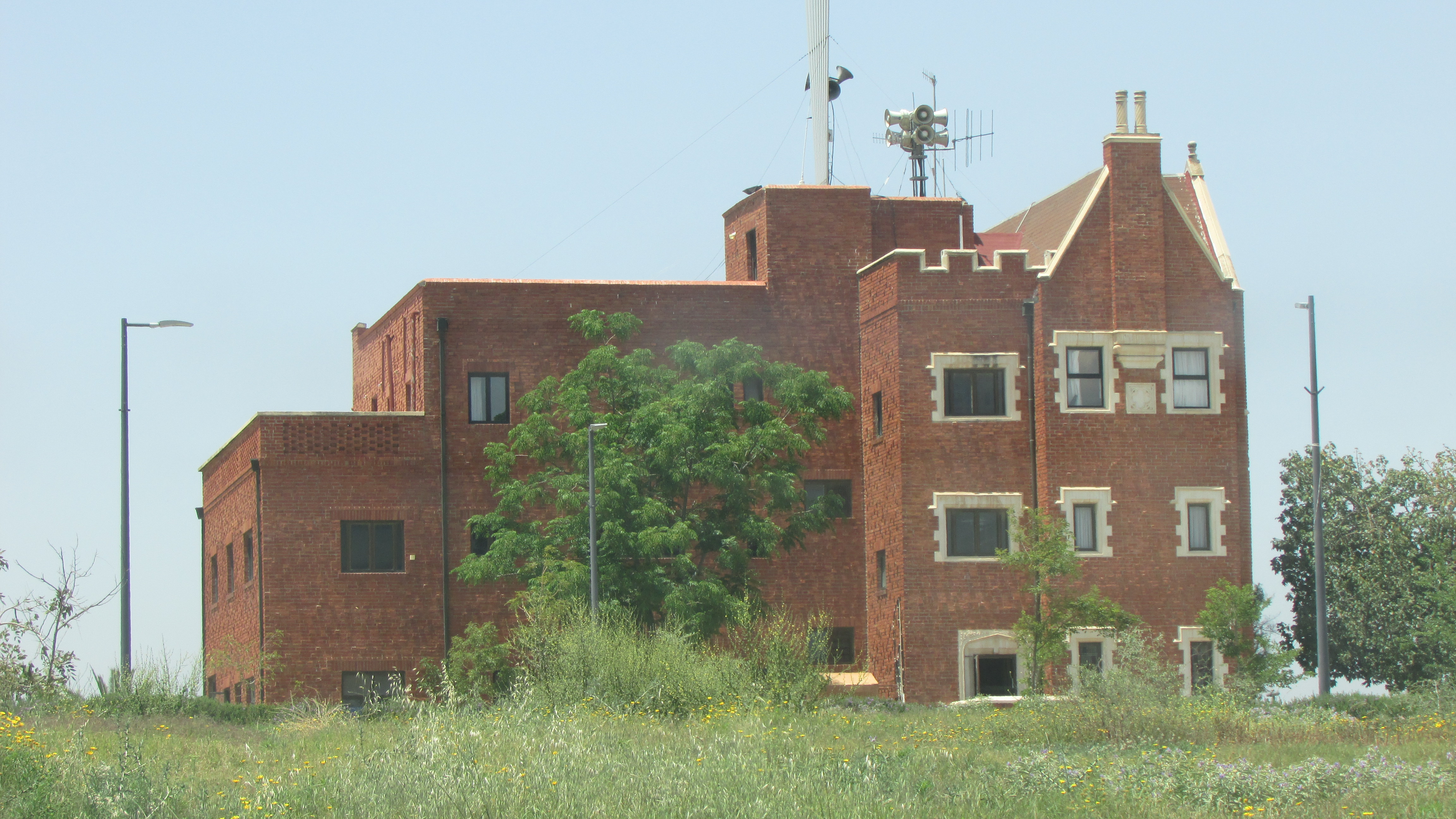 Kfar Chabad